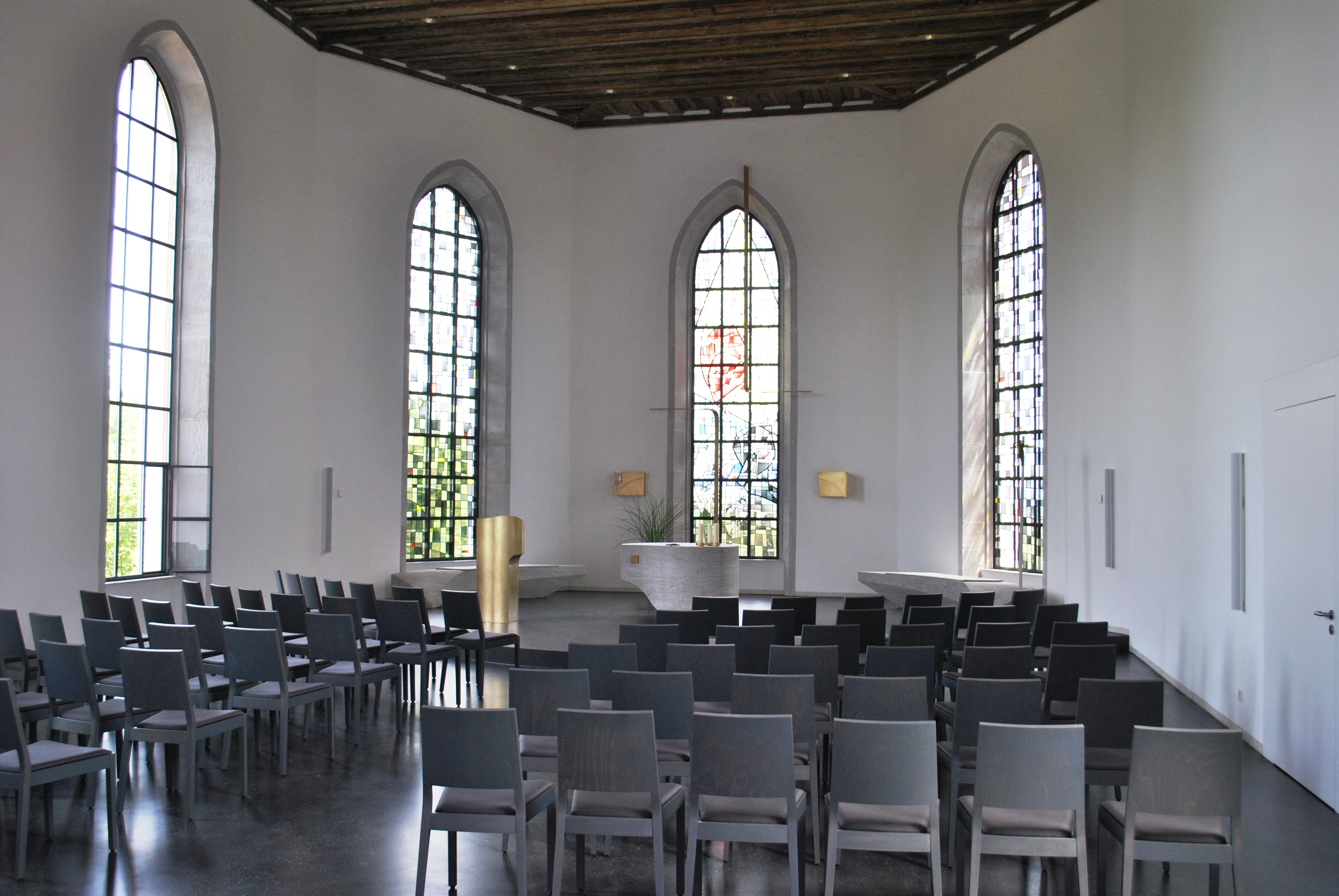 Innenraum, Klosterkirche Vogelsburg